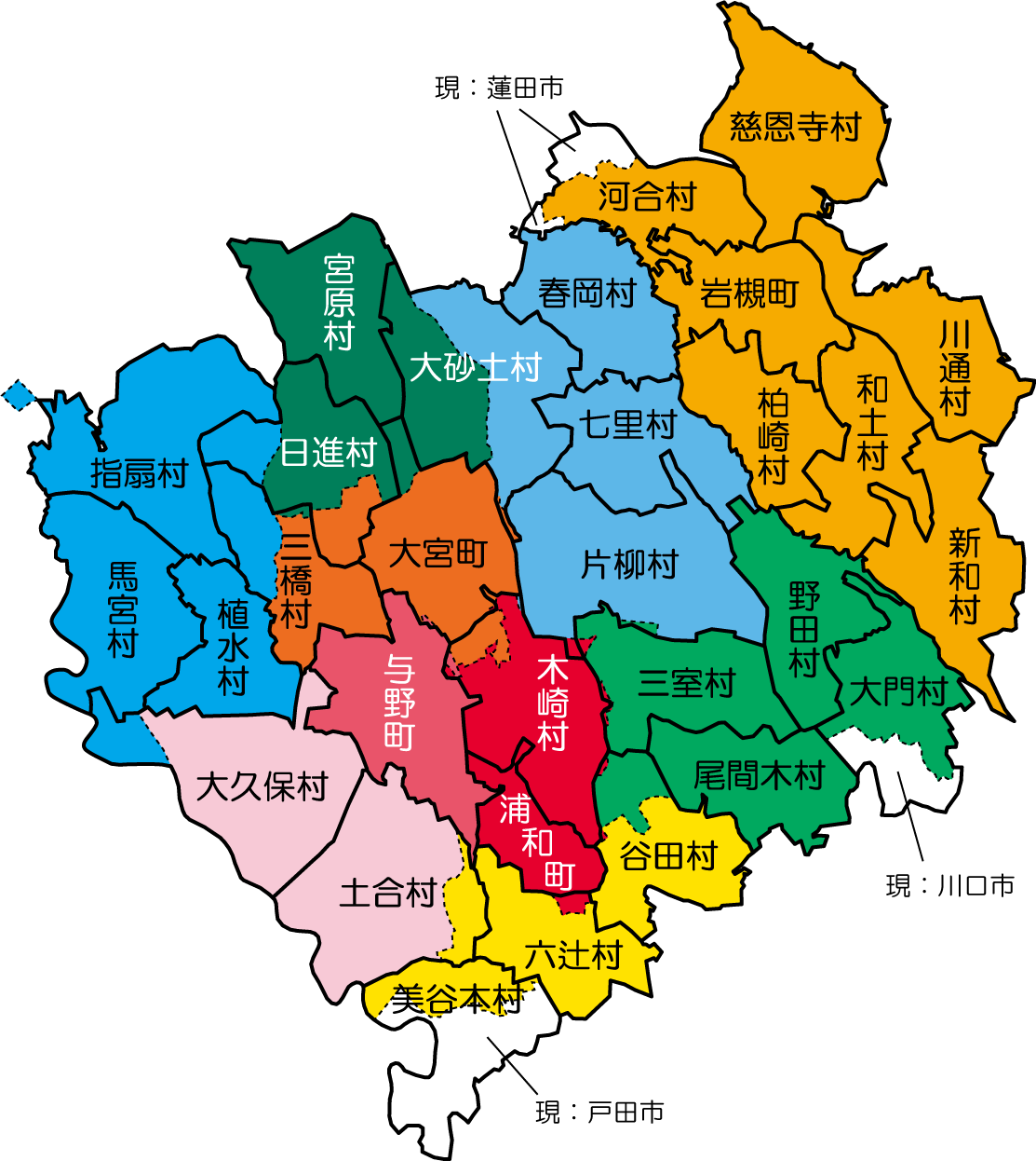 現さいたま市域の昭和初期における町村地図。 総務省統計局「地図で見る統計(統計GIS)」中の「平成22年国勢調査（小地域）」による「境界データ」、および財団法人日本地図センター「地図で見るさいたま市の変遷」を参考にVSA-itama-1710が作成。